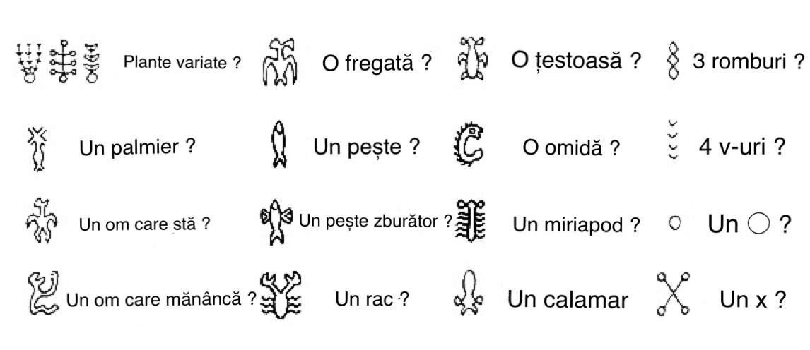 Imaginea prezintă un posibil sens al unor glife care aparțin scrierii rongorongo.